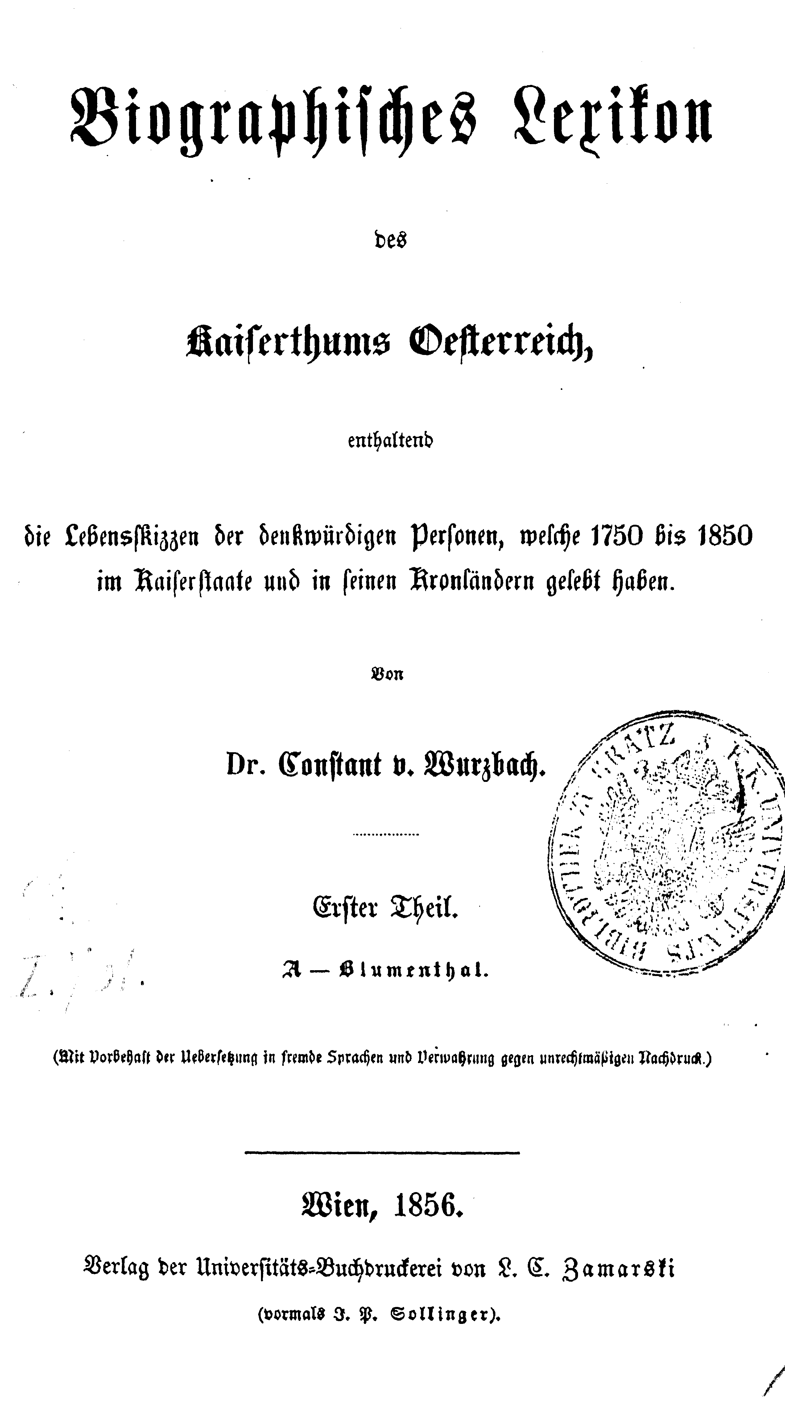 Biographisches Lexikon des Kaiserthums Oesterreich, vol.1, title page